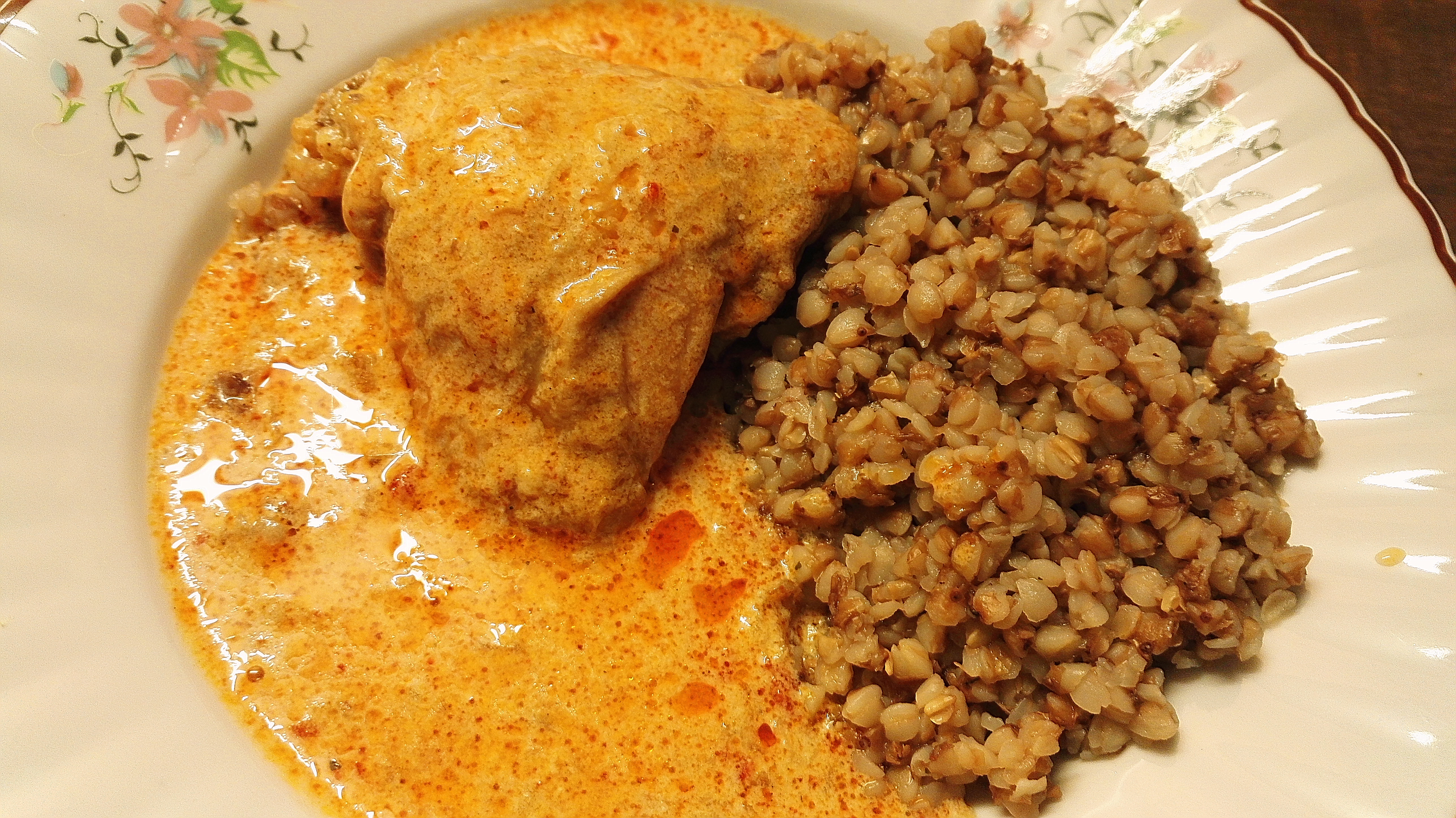 tejfölös csirke hajdinával